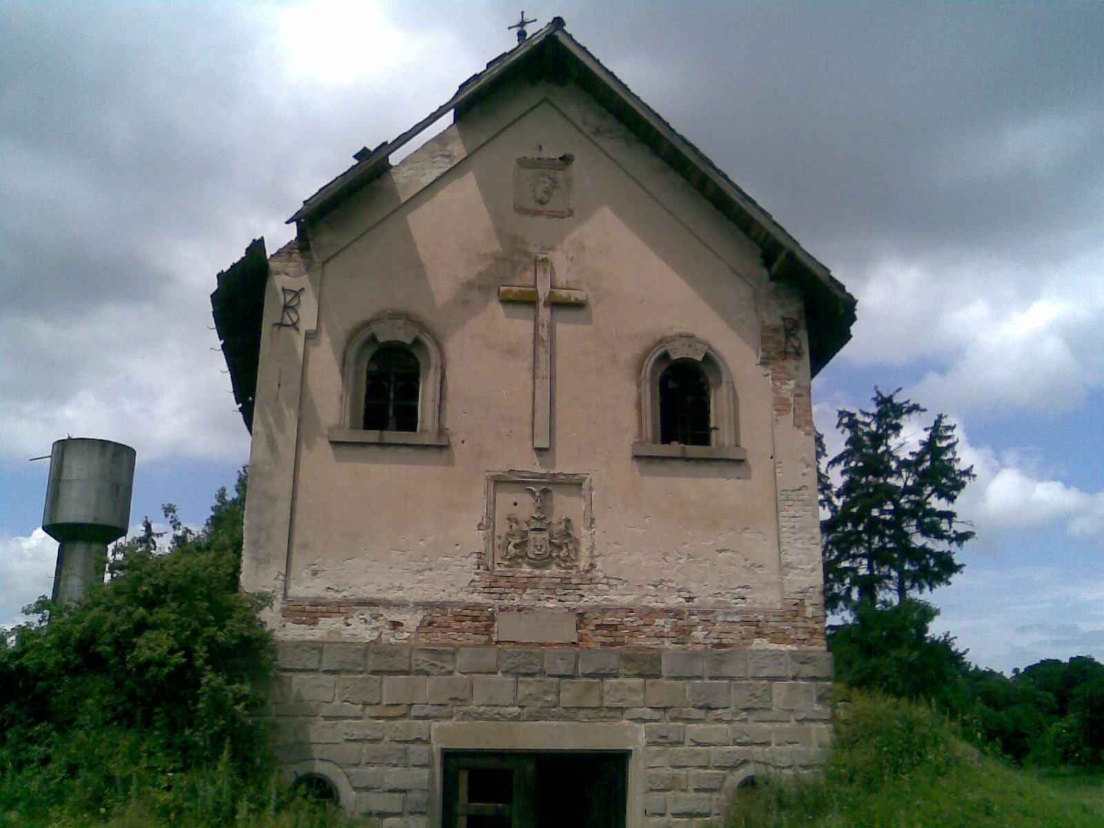 Kaplica Koziebrodzkich w Hlibowie